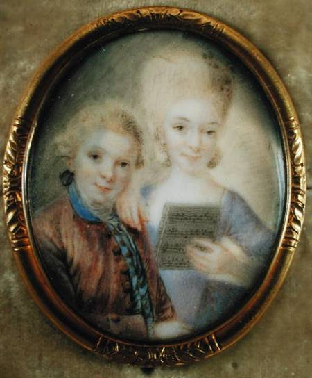 Wolfgang Amadeus Mozart (1756–1791) and his older sister Maria Anna Mozart (Nannerl) (1751–1829)